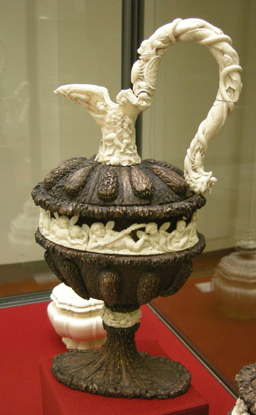 see filename: Johann michael maucher, acquamanile con scene marine, dono di papa benedetto XIV, inv. 768 02